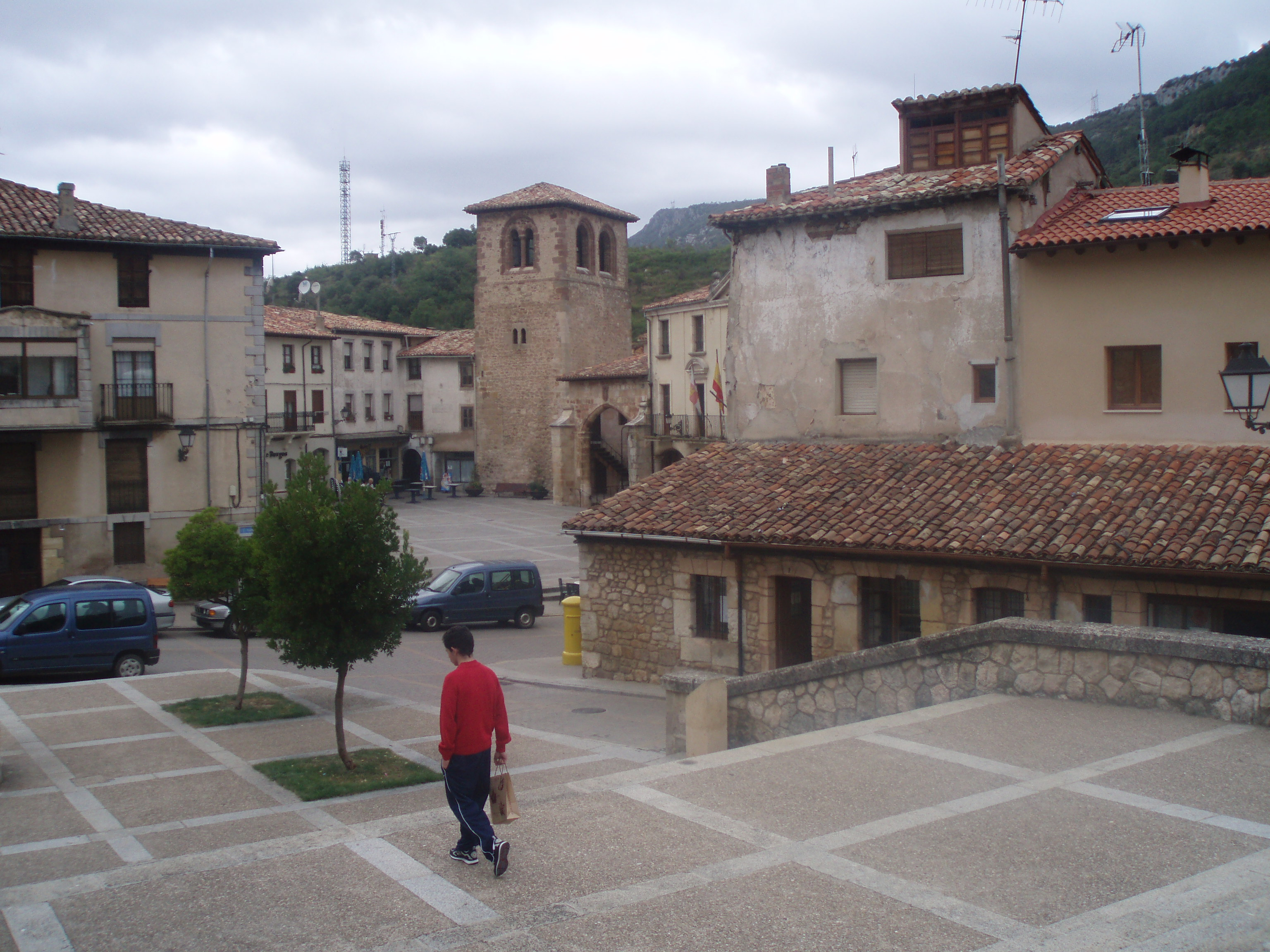 Escalinata de acceso a la iglesia del Monasterio de Oña, con la torre de la iglesia de San Juan al fondo.